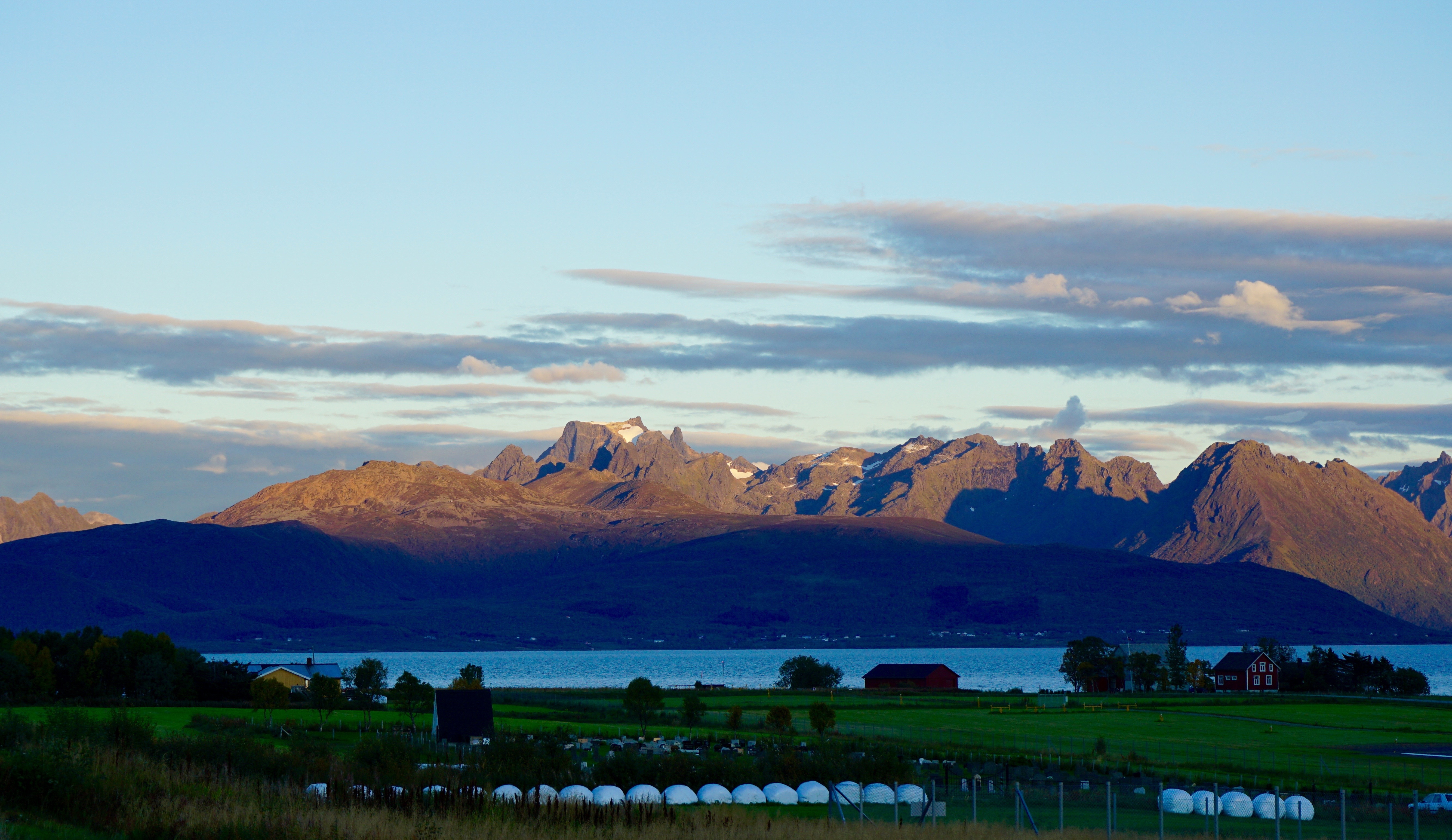 Bilde av Møysalen fra Kleiva